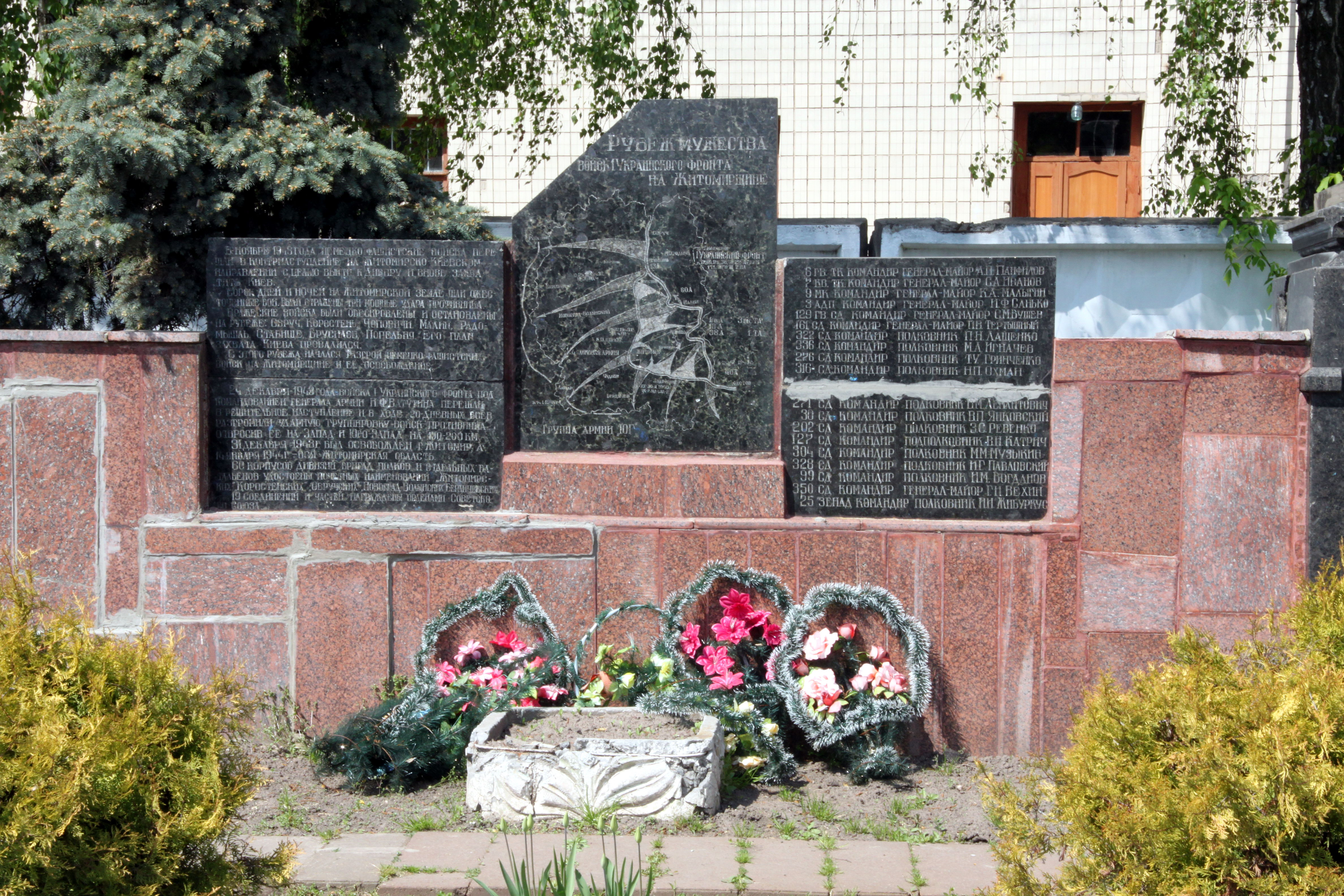 Братська могила радянських воїнів. Поховано 82 чол., м. Радомишль, вул. Леніна., Радомишльський район